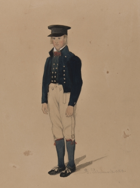 Pojke i dräkt. Akvarell av P Södermark 1850. Depicted place: Q10576235 (Q10576235)